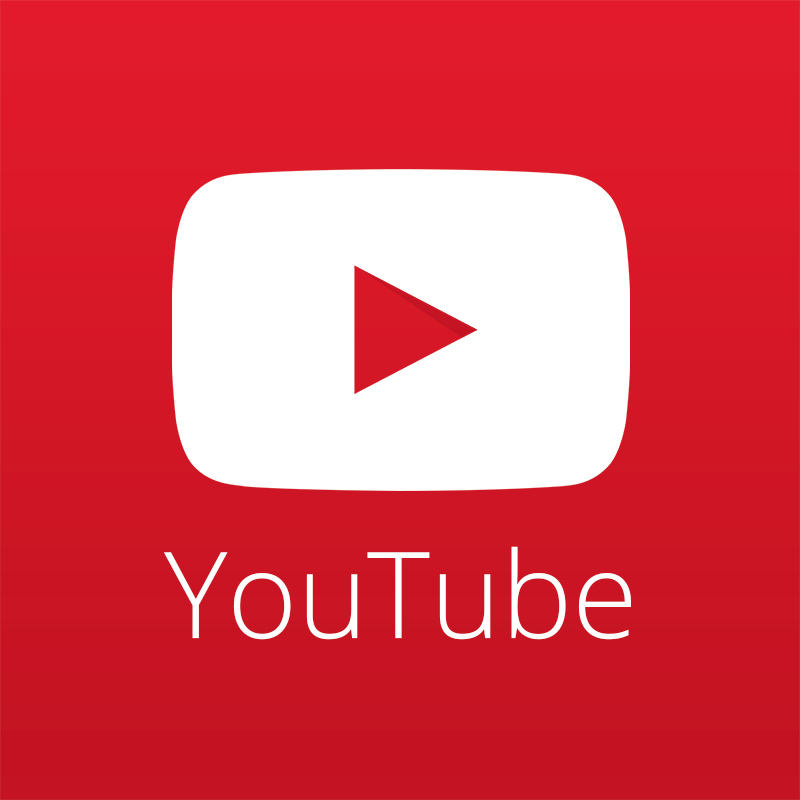 Logo YouTube stosowane tylko na portalach społecznościowych.